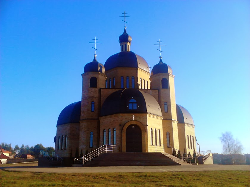 Cerkiew Zmartwychwstania Pańskiego w Siemiatyczach